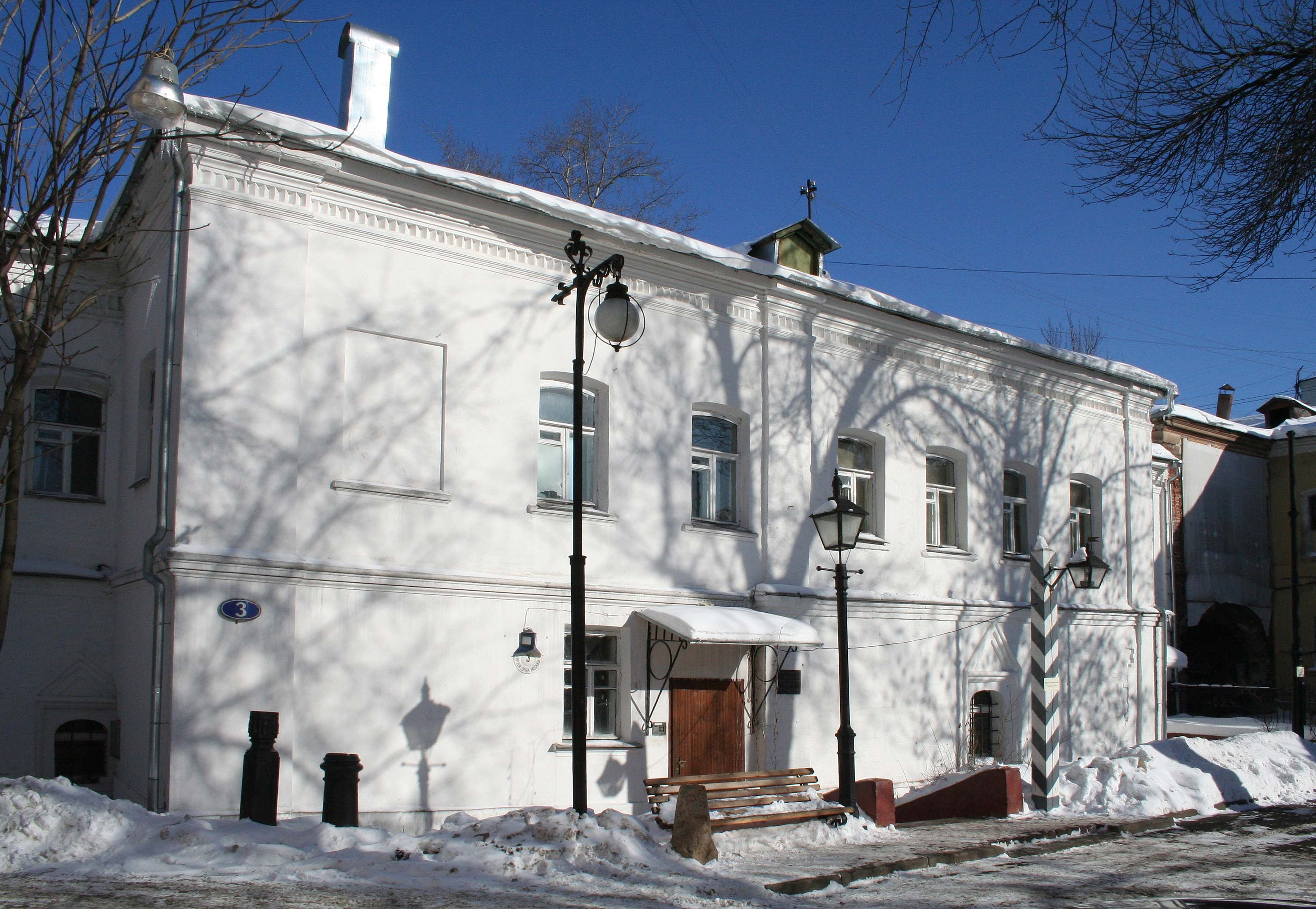 С 1980 года в центре Москвы, в Армянском переулке, находится Музей «Огни Москвы». Погружение в историю города начинается еще со скверика, расположенного перед зданием музея — боярскими палатами XVII века. Здесь можно увидеть старинные масляный, керосиновый, электрический фонари: выстроившись в ряд, они первыми встречают гостей музея.